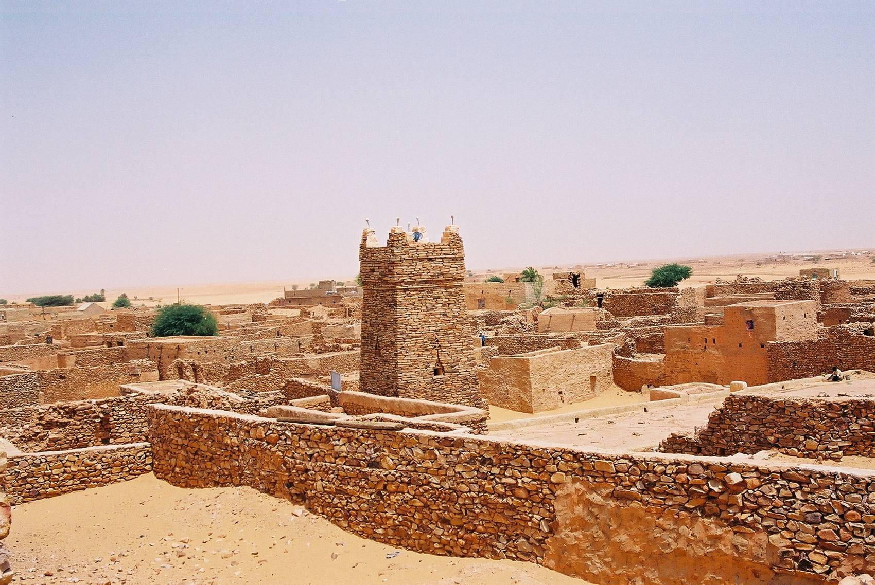 Vue Generale de la vieille ville de Chinguetti en Mauritanie